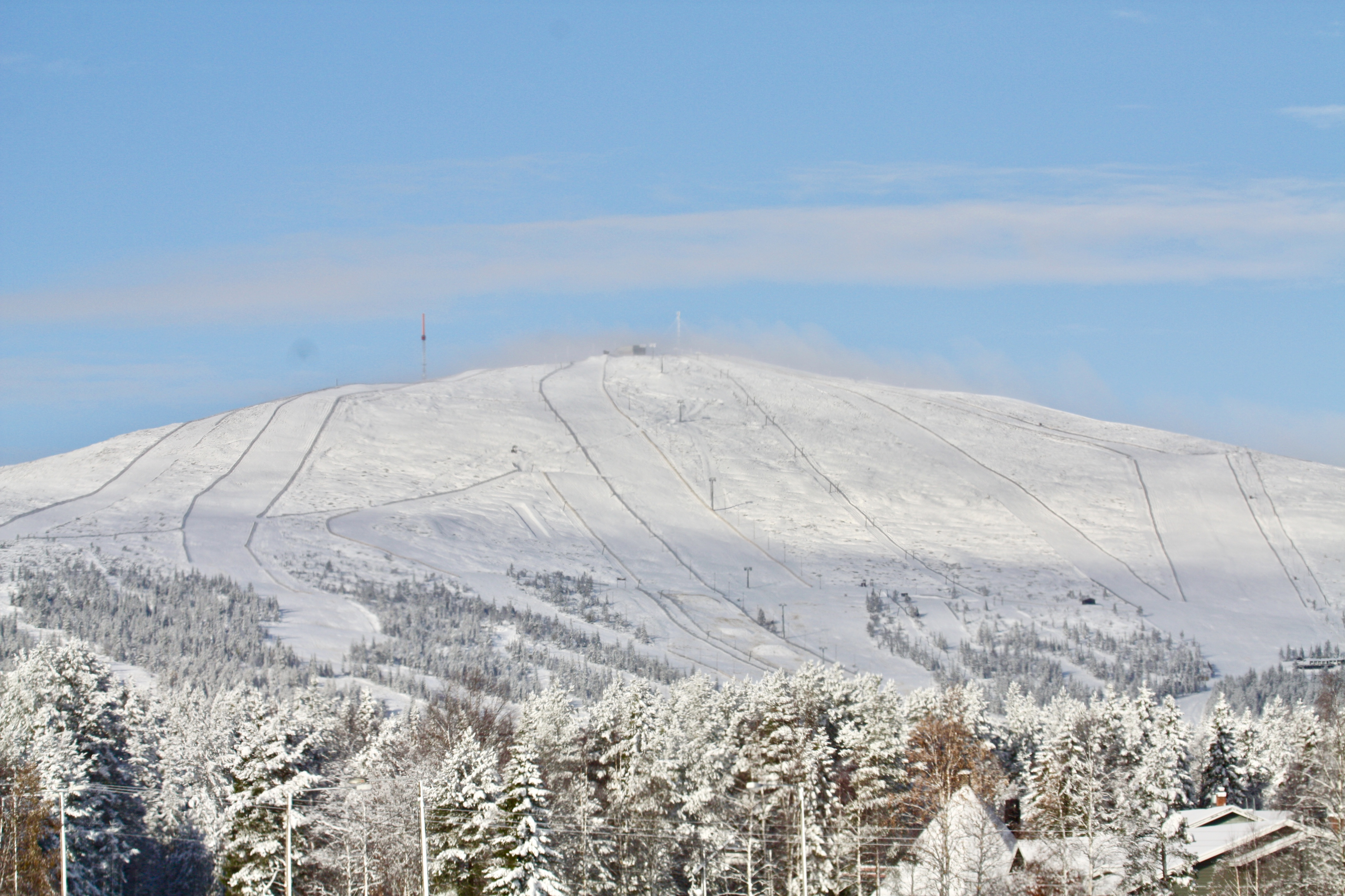 Sport Resort Ylläksellä on Suomen pisimmät rinteet ja gondolihissi, joka on auki myös kesällä.